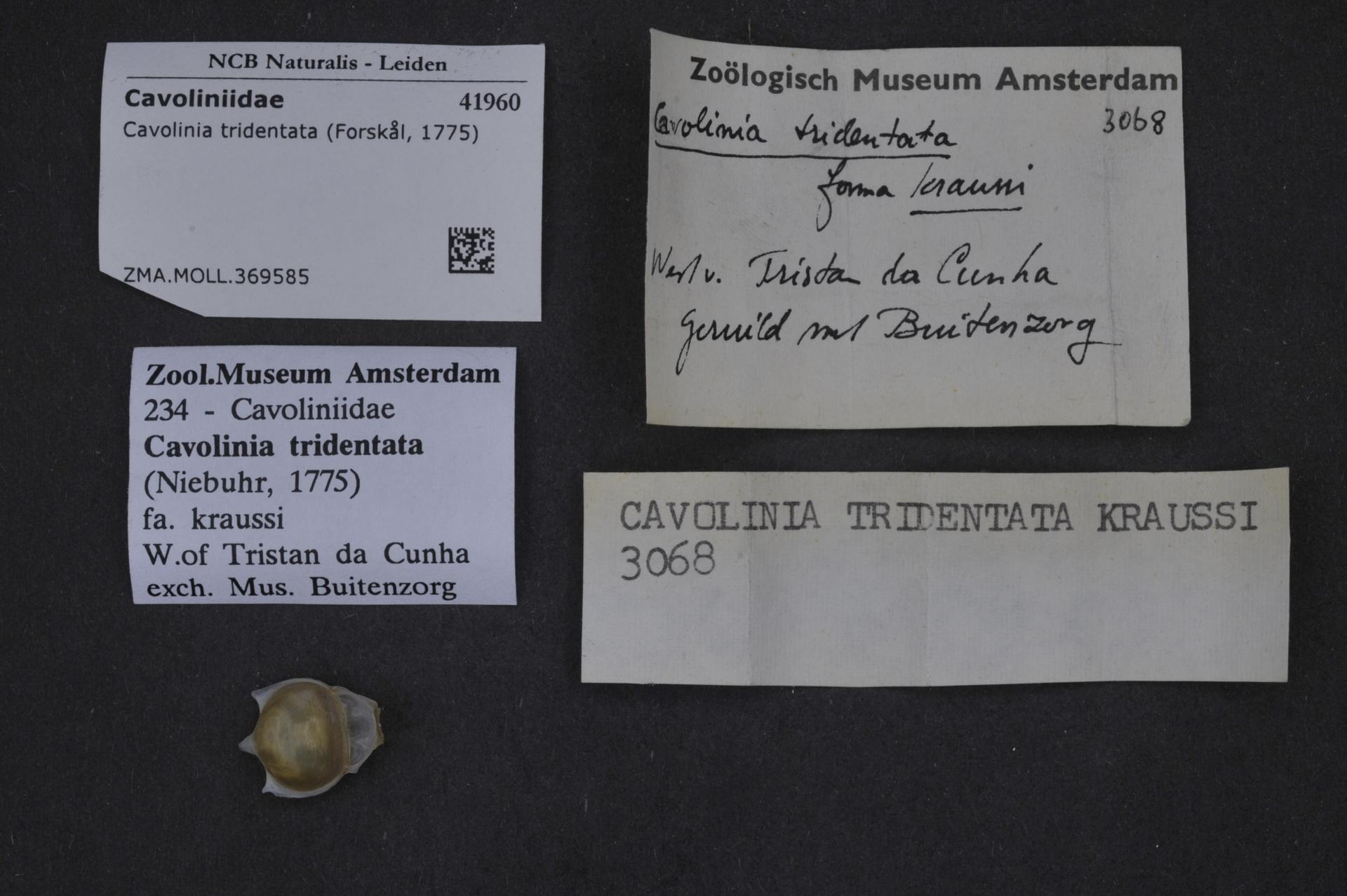 Cavolinia tridentata (Forsskål, 1775)